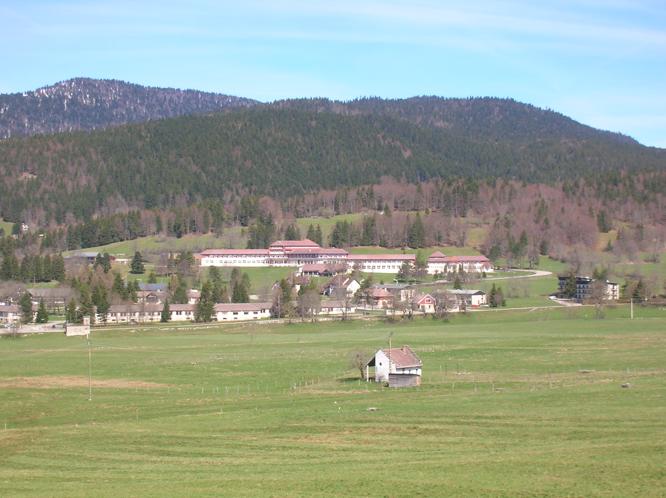 Autrans, Isère, France.